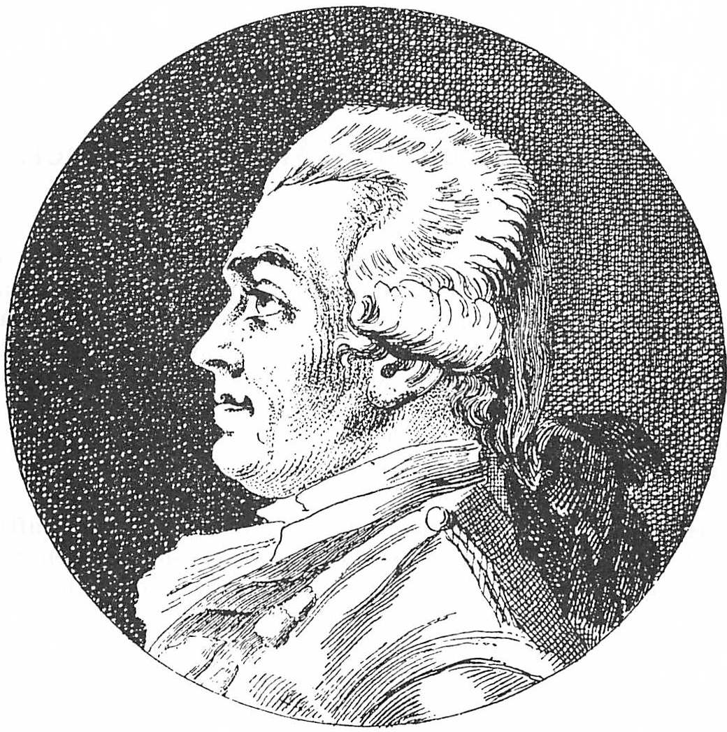 Otto Henrik Nordenskjöld (1747-1832)